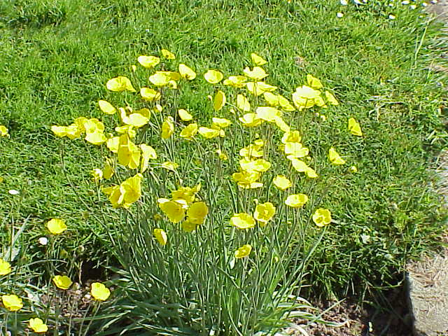 Species: Ranunculus gramineus Family: Ranunculaceae Image No. 4